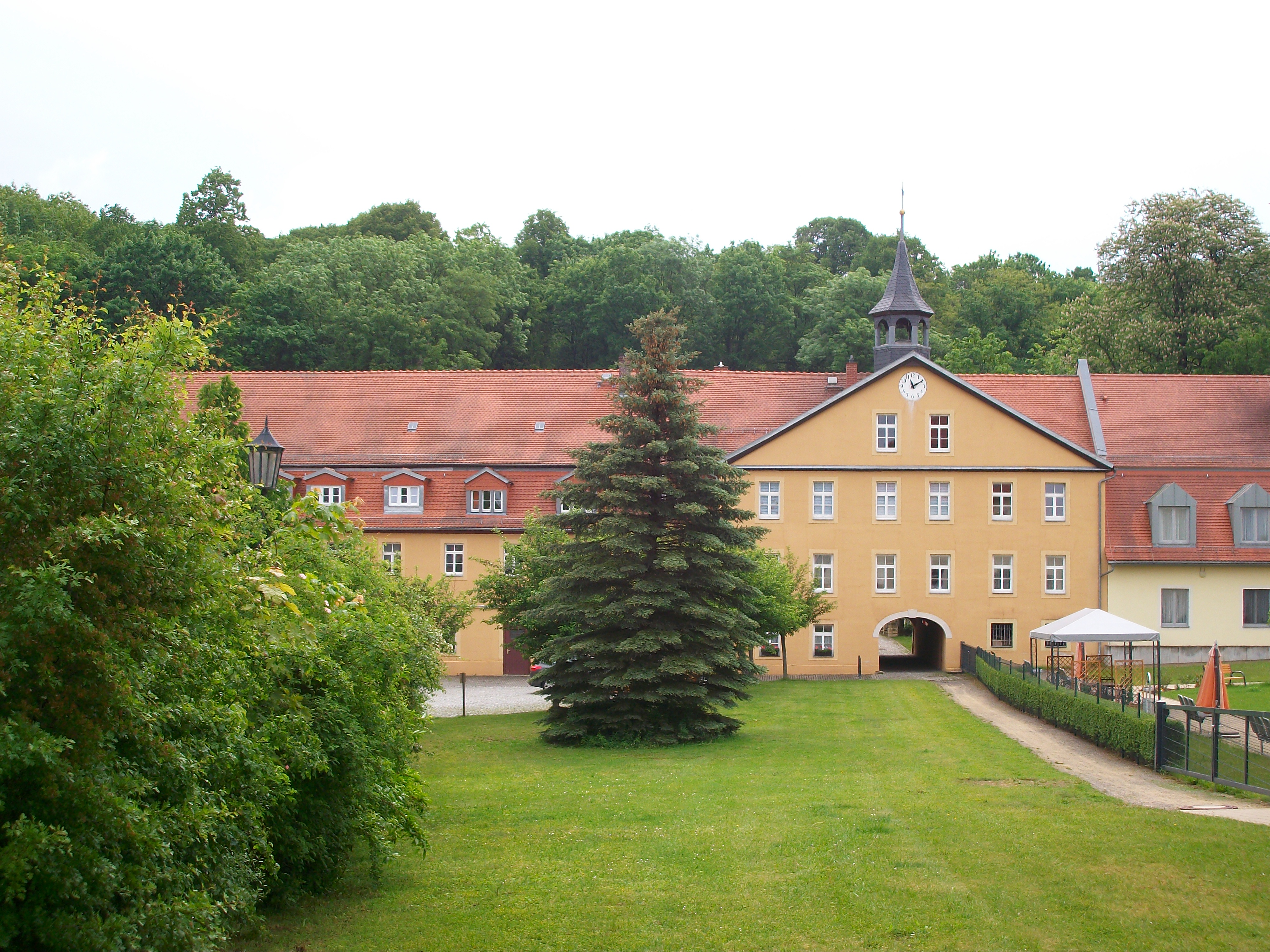 Schloss Löbichau (Neubau)